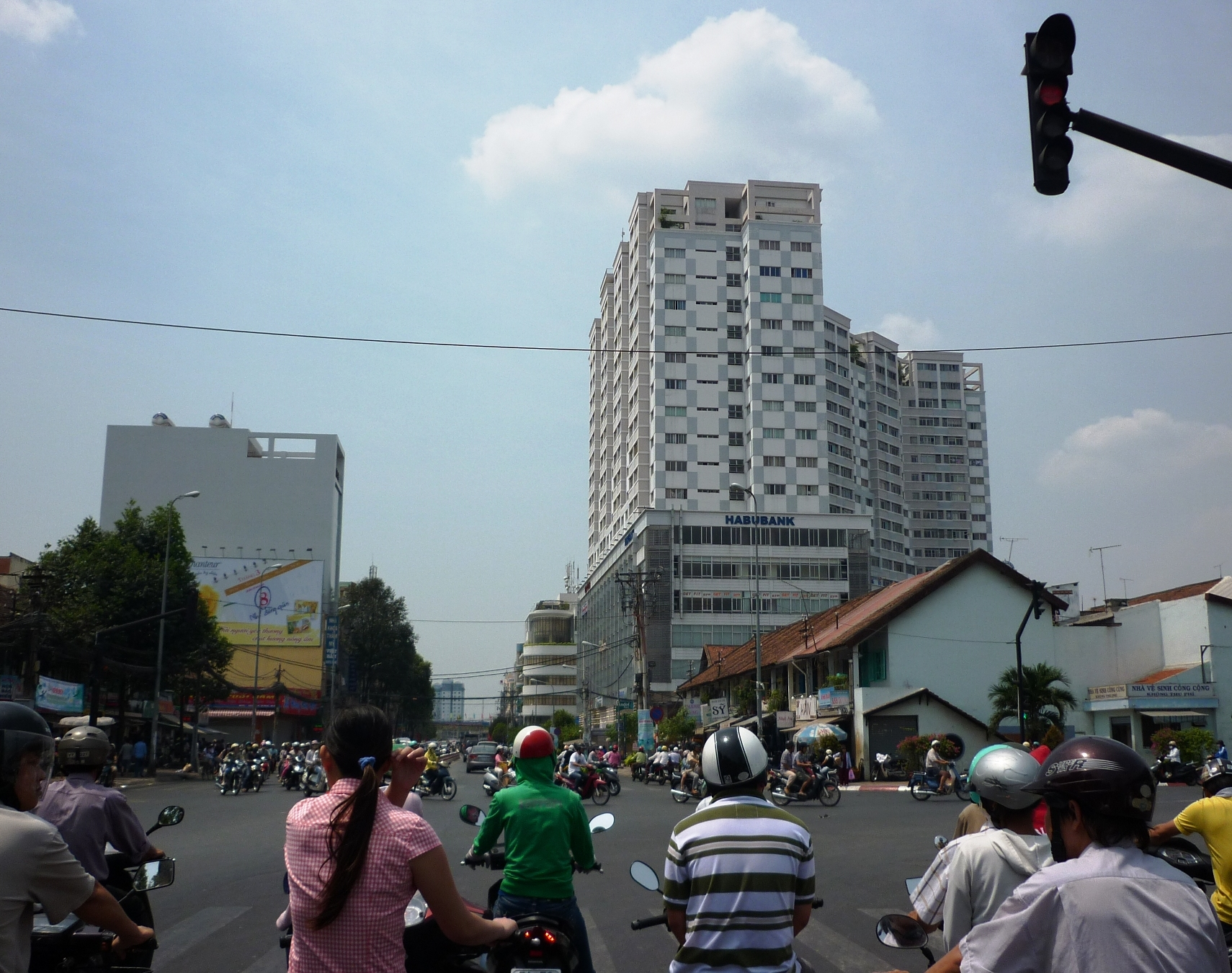 Giao lộ Hoàng Diệu và đường lên cầu Ông Lãnh luôn tấp nập phương tiện giao thông.